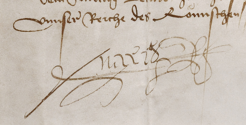 Große Ausfertigung der Unterschrift Maximilians I. als Römischer König auf einer Urkunde vom 10. März 1497